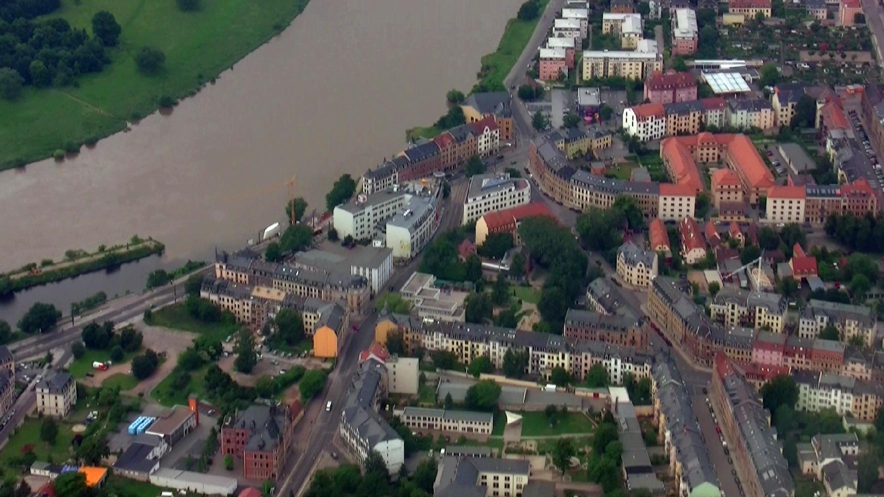 Luftaufnahme mit Blick auf Dresden Pieschen. Hafenausfahrt zur Elbe, Ballhaus Watzke sowie links unten das Rathaus Pieschen.